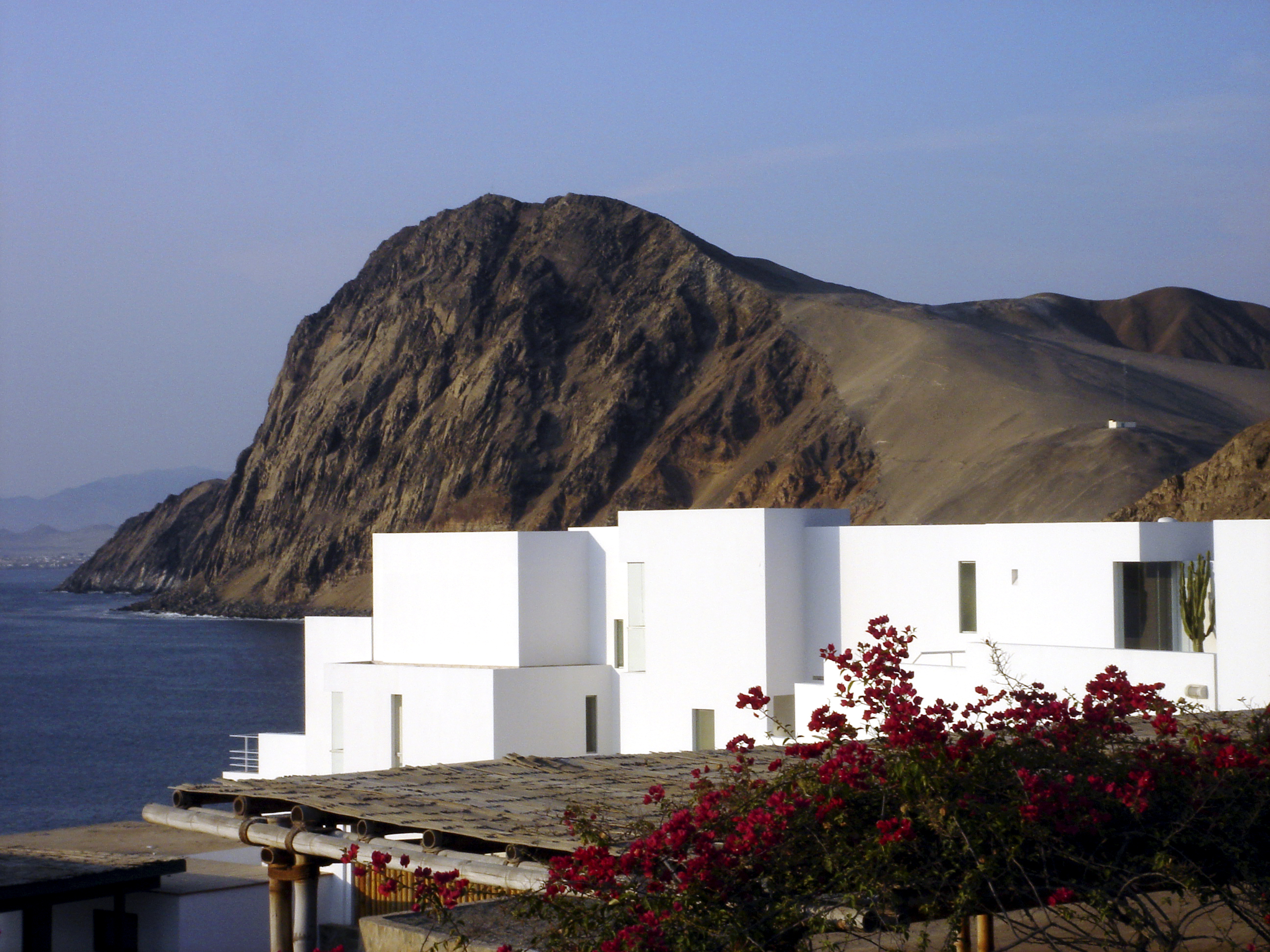 Edificio en contexto, Alfredo Benavides y Cynthia Watmough